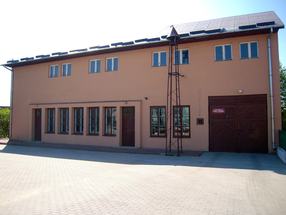 Remiza OSP Wola Osowinska.